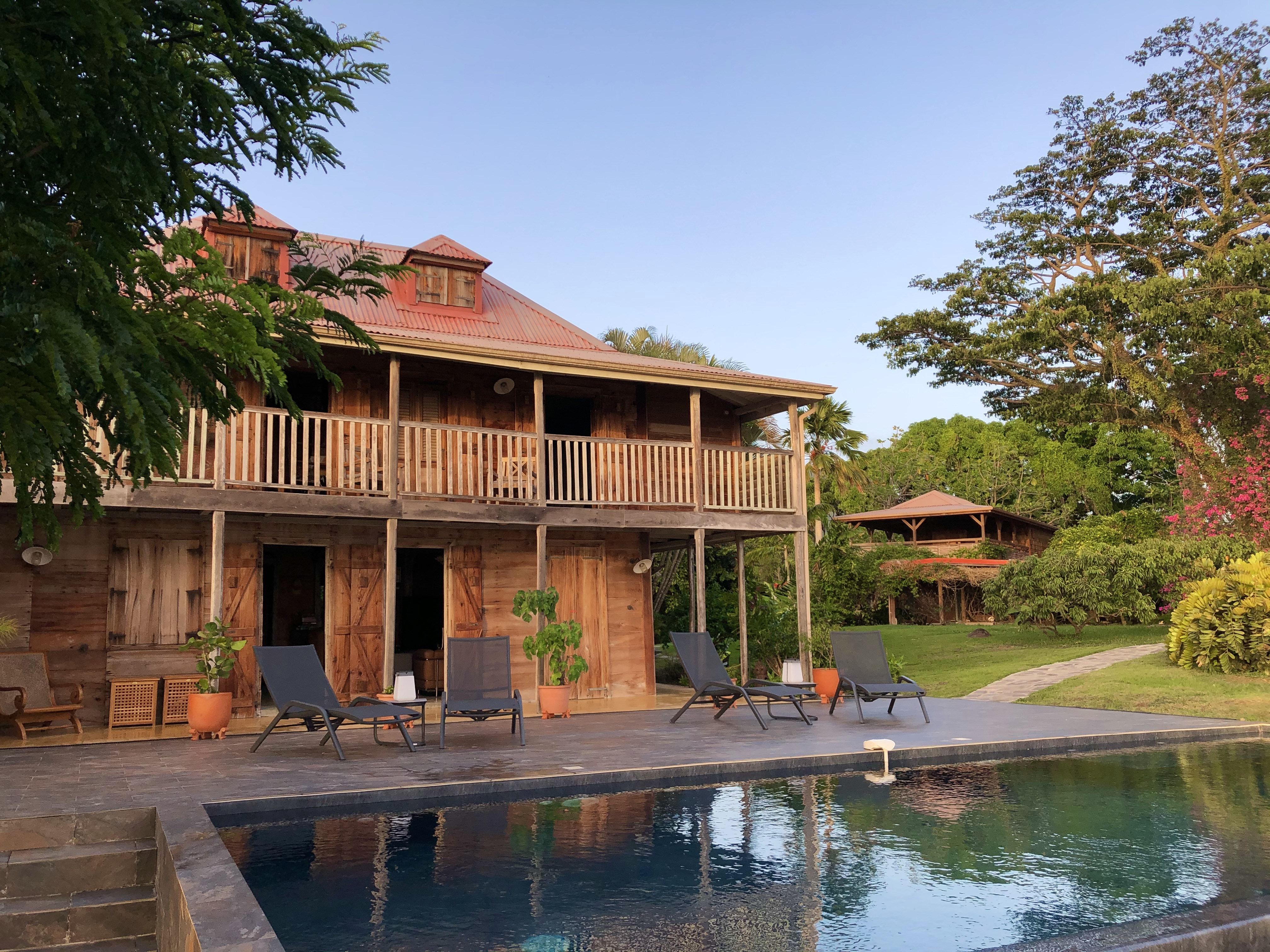 Ancienne Caféière Beauséjour